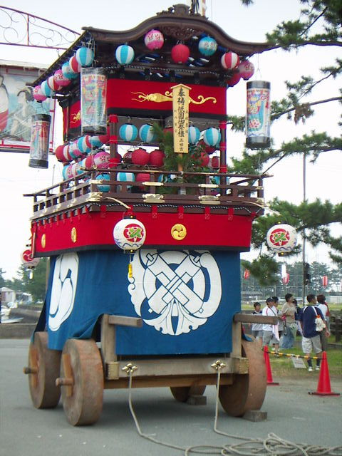 大淀祇園祭、業平松公園にて